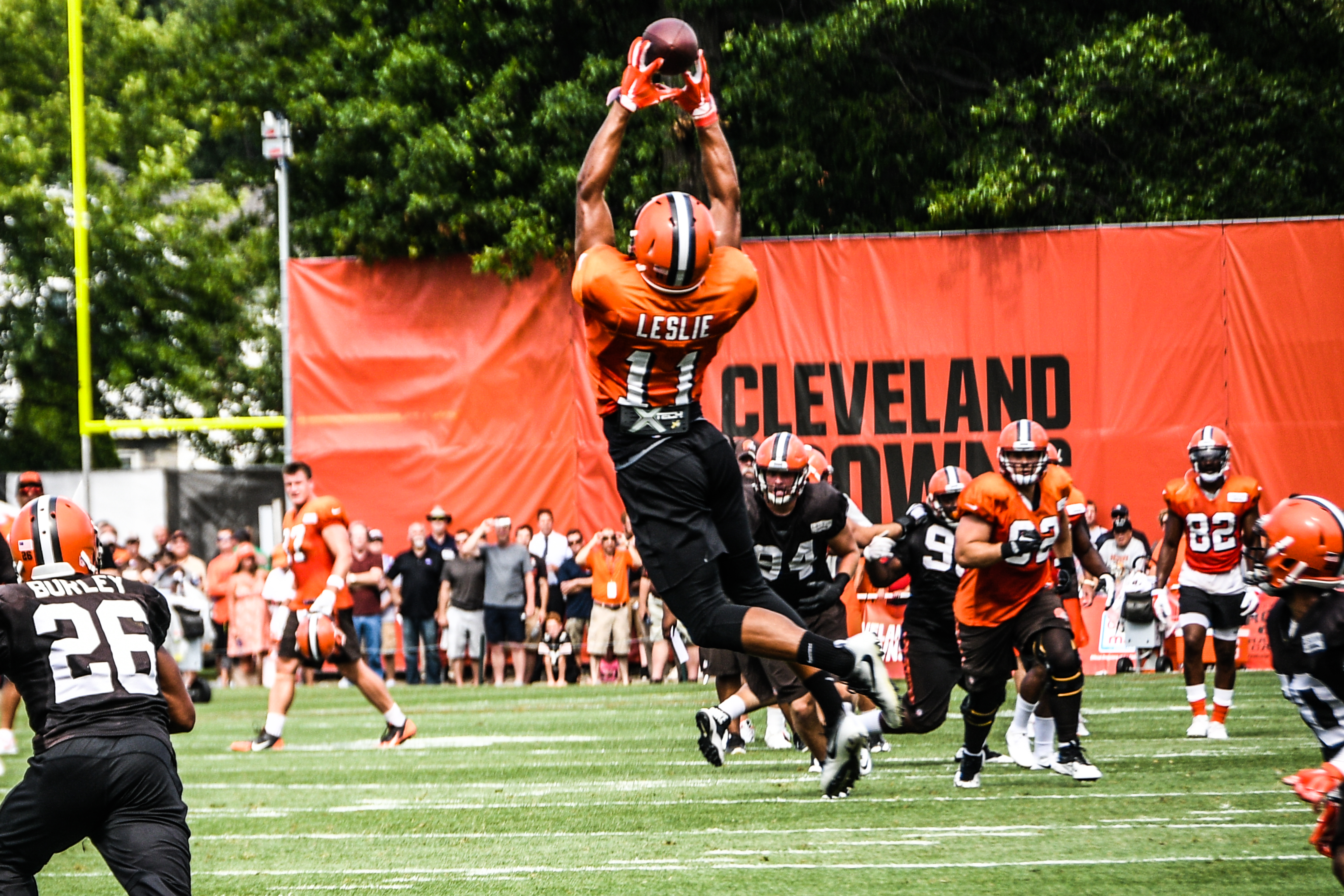 Jordan Leslie